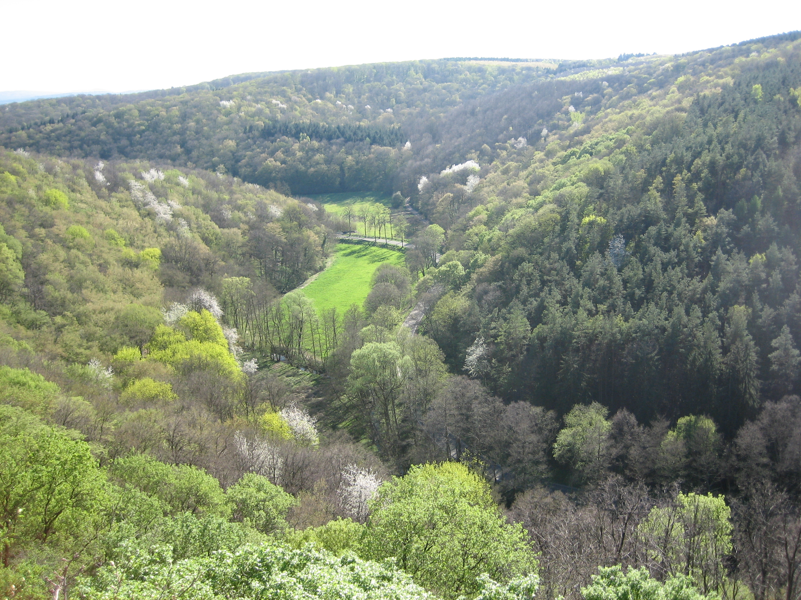 view from Teufelsrutsch, Wendelsheim, Germany